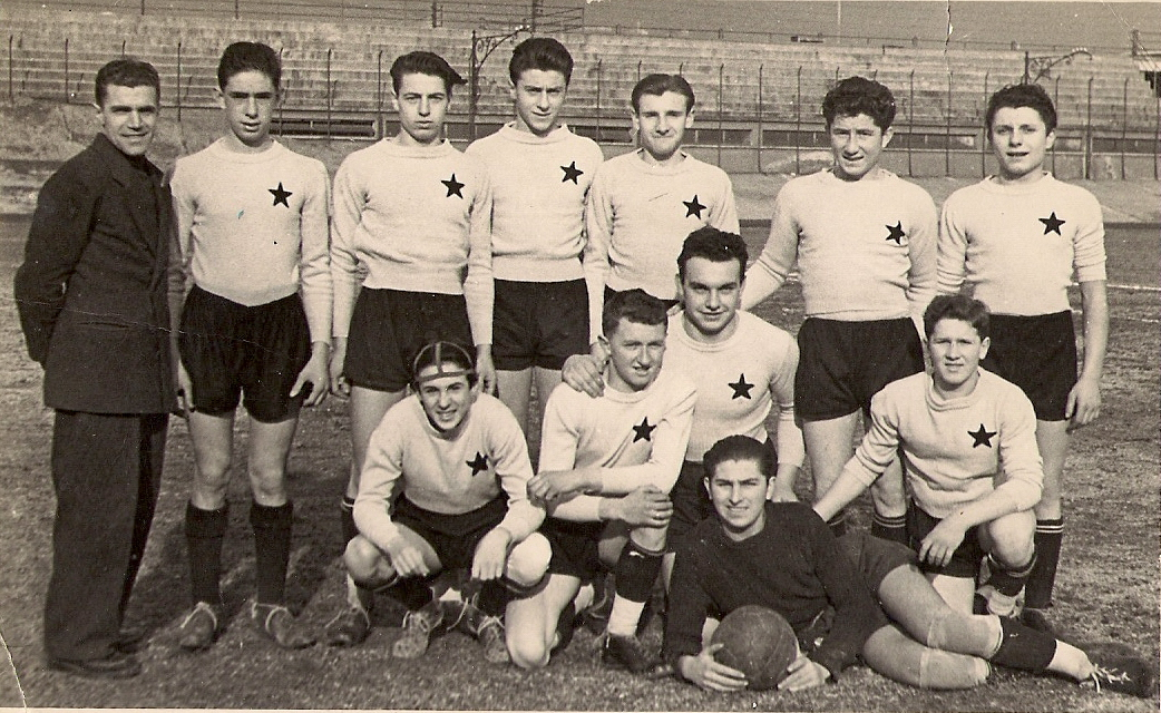 Prima squadra dell'Esperia-Fino della stagione 1946-47. Immagine fornita da Giampiero Beretta, allora terzino.